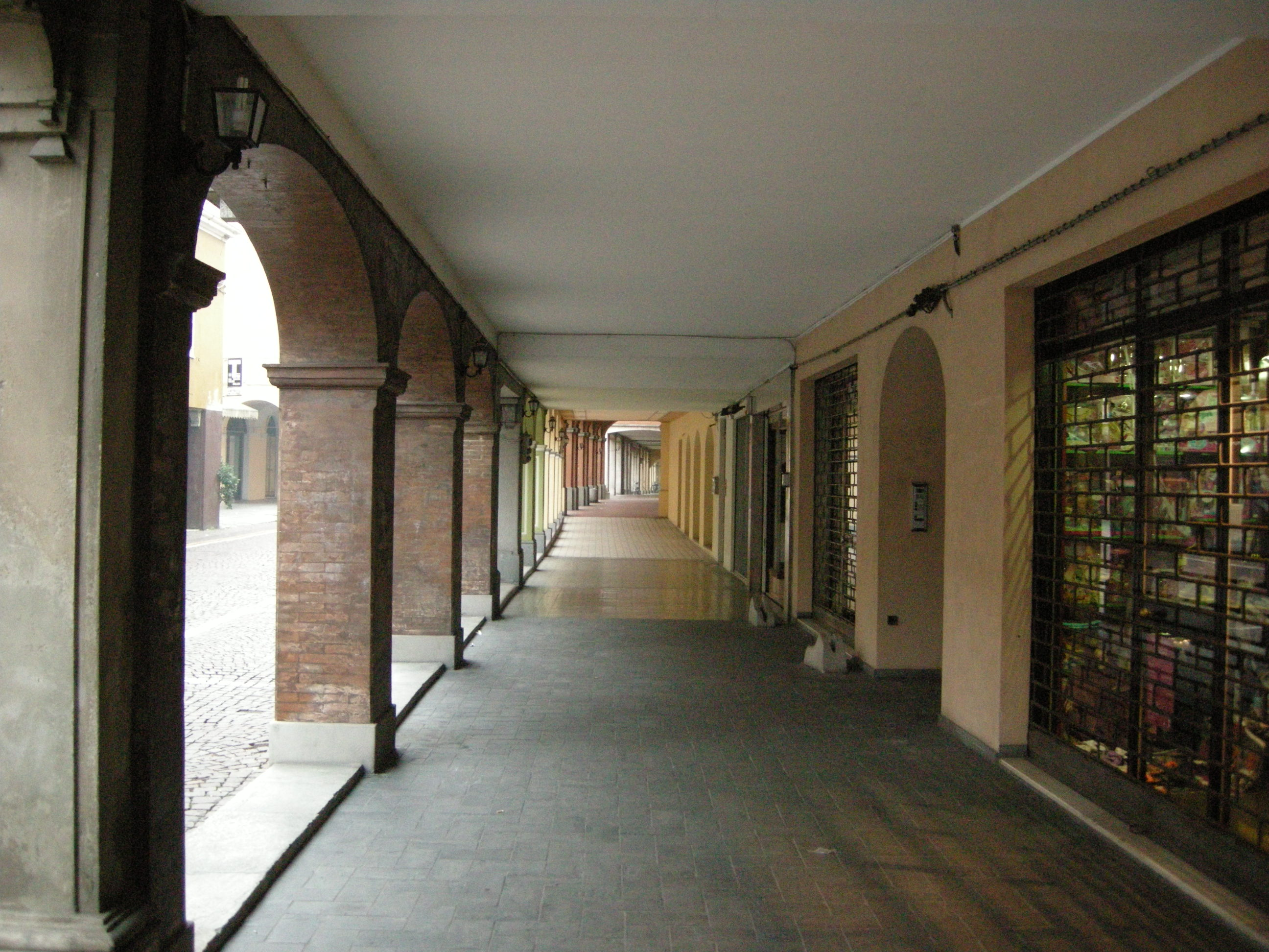 San secondo parmense, portici